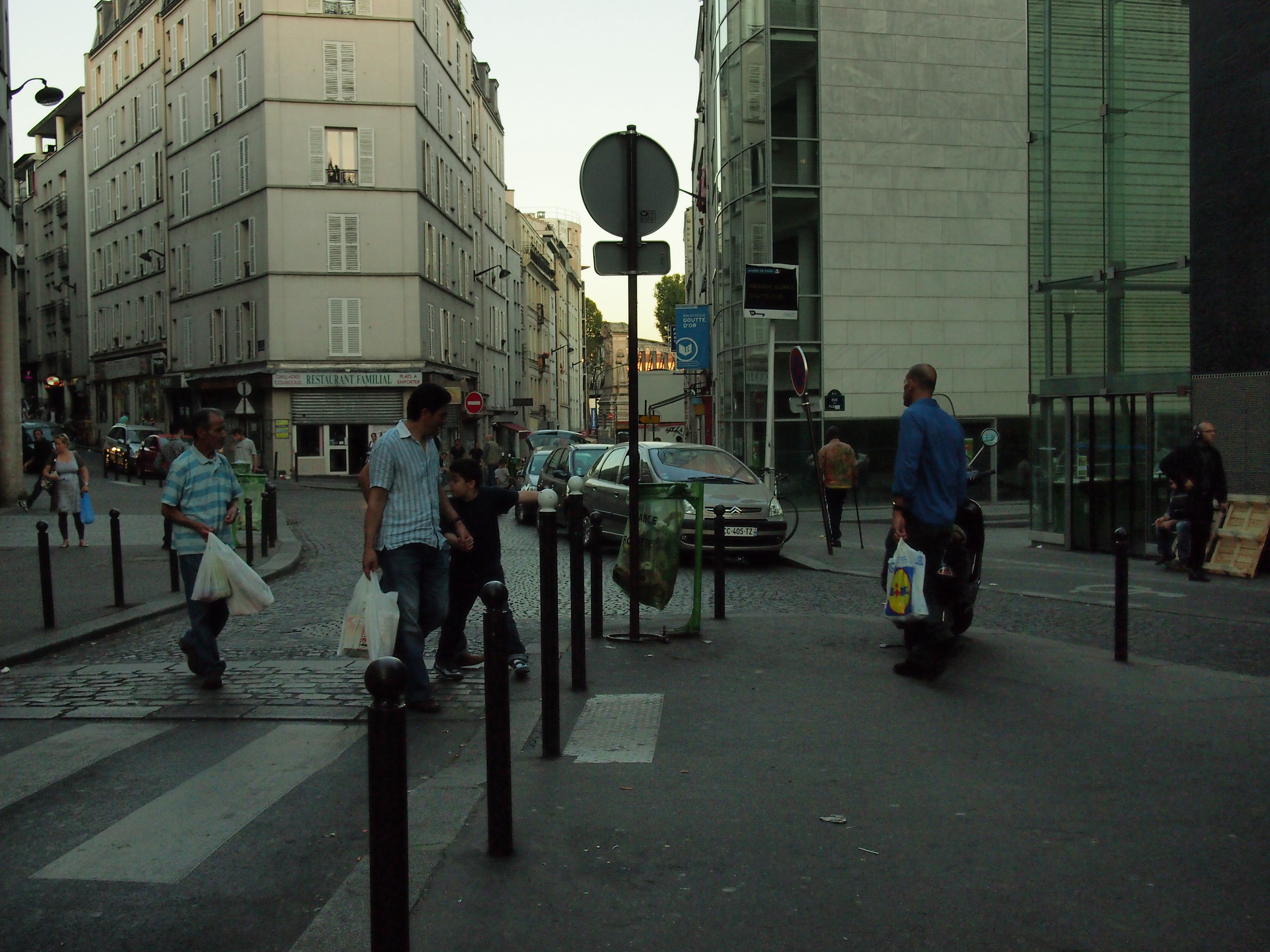 Angle de la rue de Chartres et de la rue de la Charbonnière, ancienne place Saint-Ange. Quartier de la Goutte d'Or. Paris XVIIIe. France.